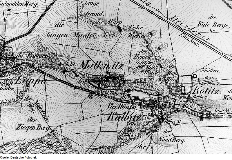 Original image description from the Deutsche Fotothek Wermsdorf-Malkwitz. Oberreit, Sect. Oschatz, 1839/40